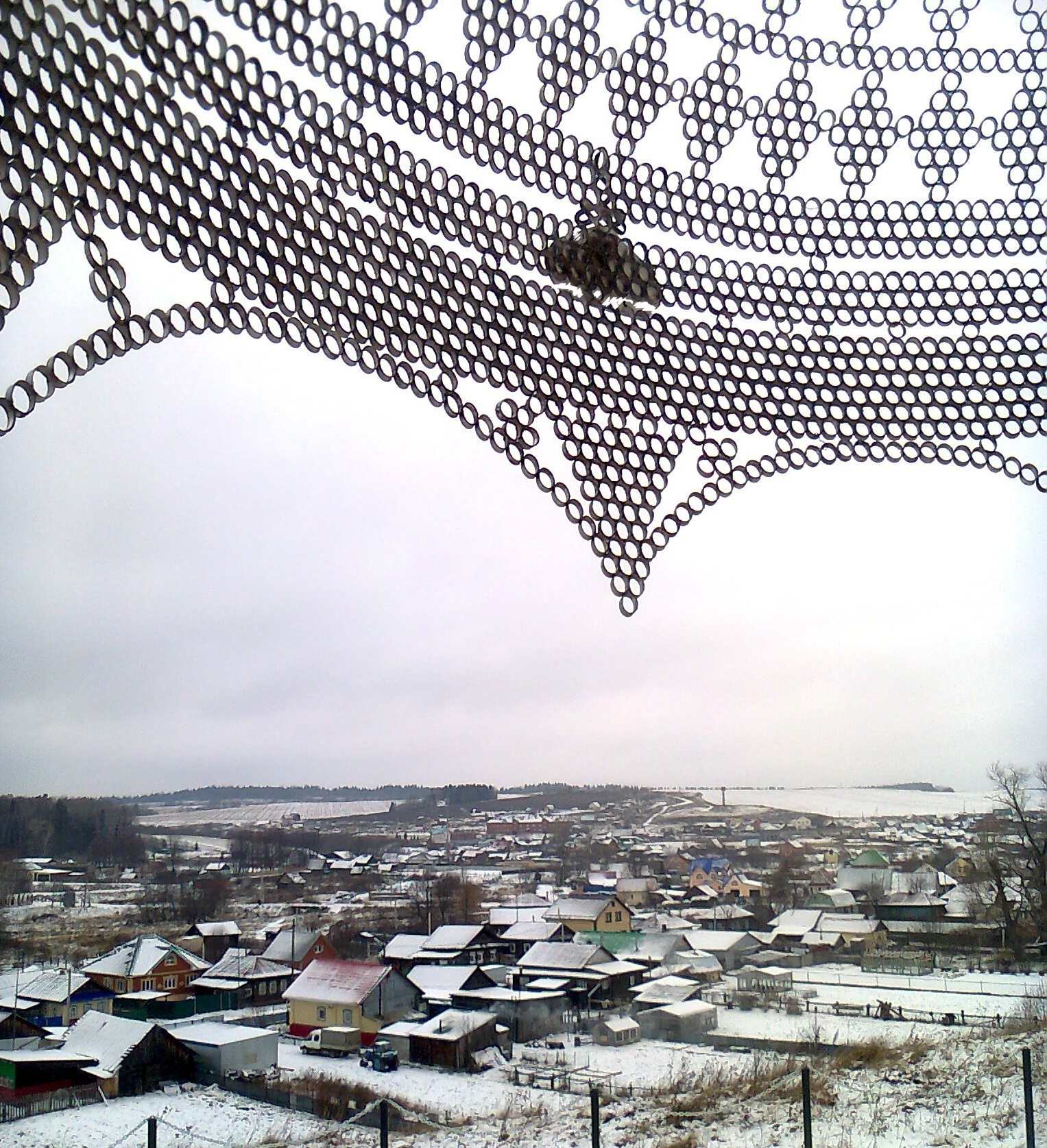 Дер. Башкултаево с памятника "Шлем батыра"